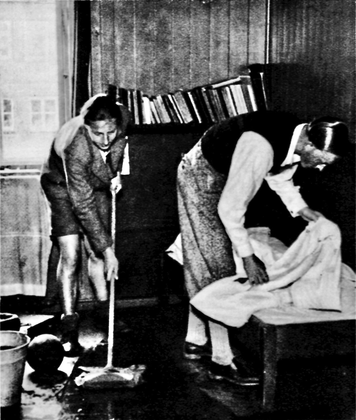 Tägliches Reinschiff 1931/32 im reformpädagogischen Landerziehungsheim Schule am Meer auf Juist, Ostfriesland. Die Schüler sorgen mit einem Ordnungsdienst selbst für saubere und aufgeräumte Zimmer und frisch bezogene Betten.